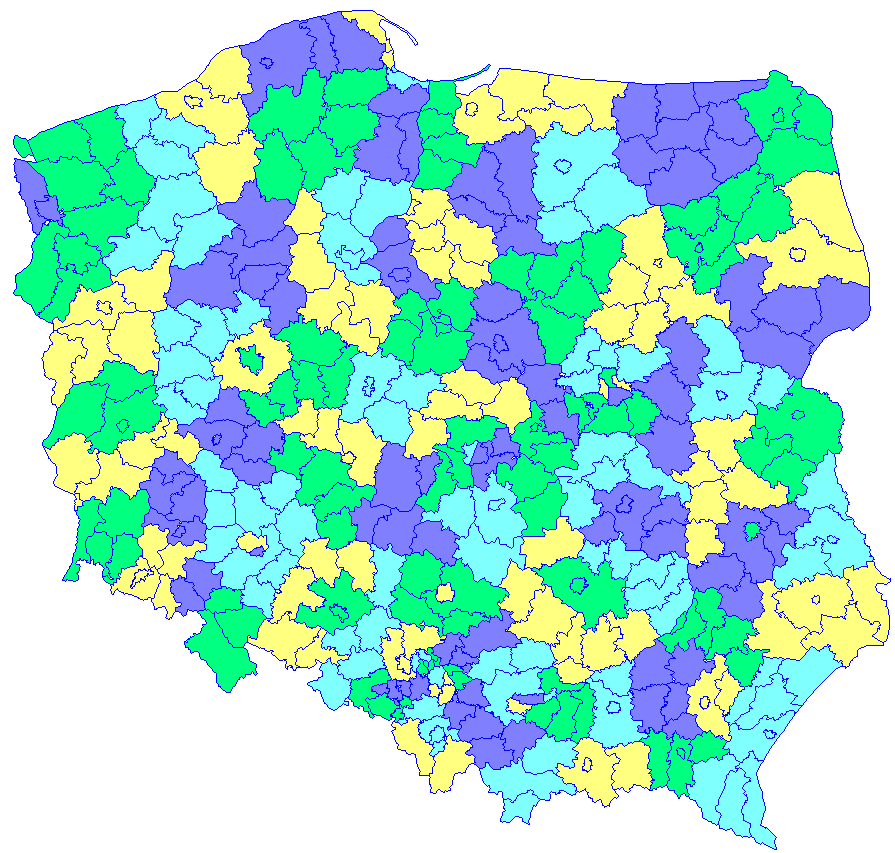 Jednomandatowe okręgi wyborcze do Senatu. Granice okręgów wyborczych w obrębie Krakowa, Łodzi, Warszawy i Wrocławia – schematyczne.